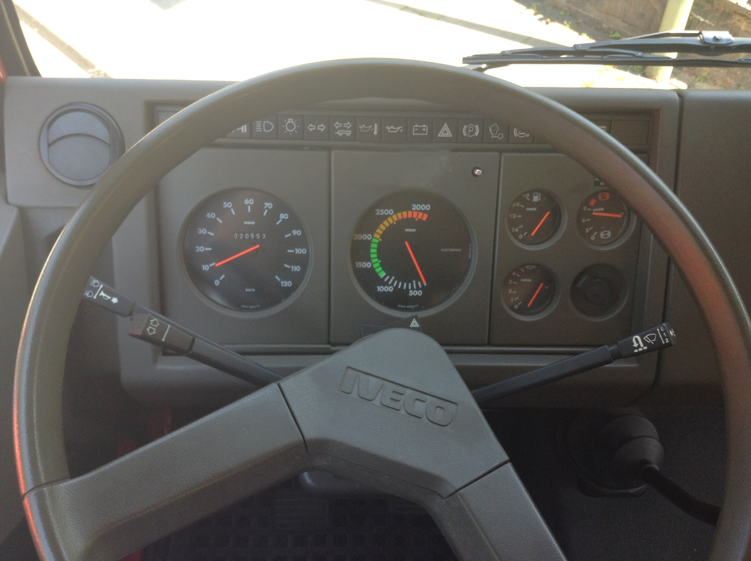 Fahrerplatz eines Iveco-Magirus 90-16 AW Turbo